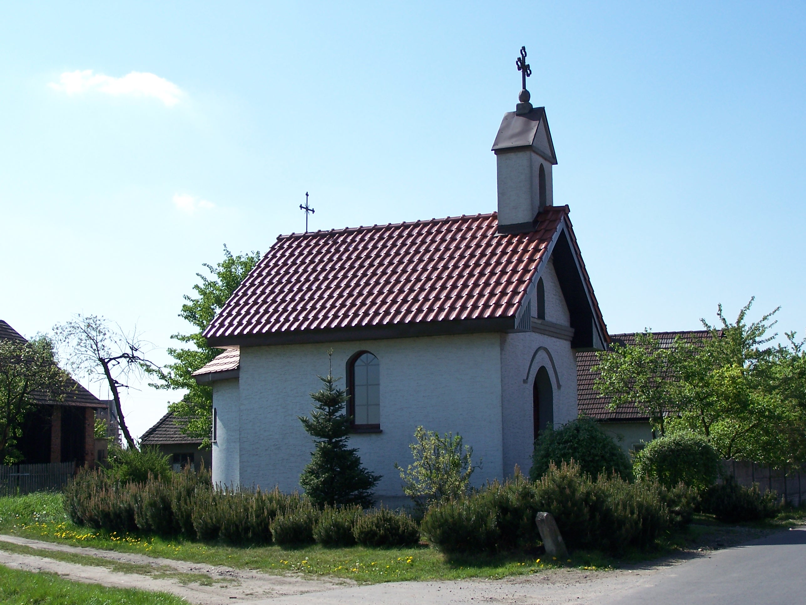 Kapliczka w Jeżowej zbudowana w roku 1881